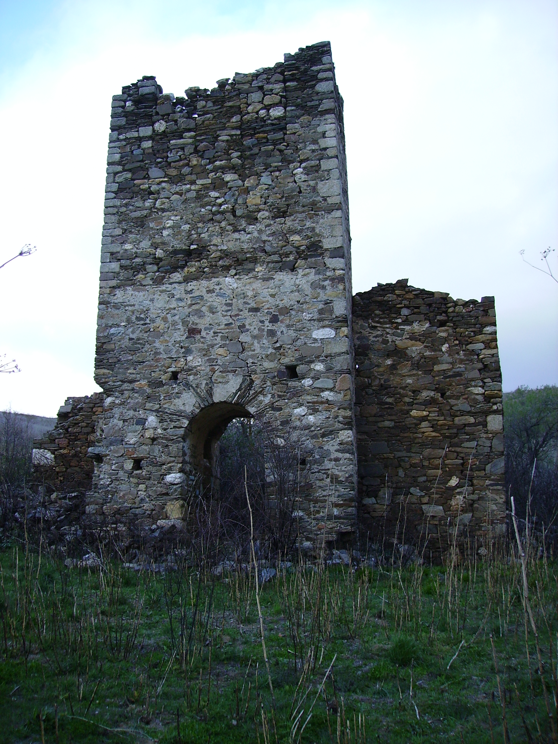 Restos de la ermita de Folibar. Cerca de San Esteban de Valdueza (Ponferrada, El Bierzo)